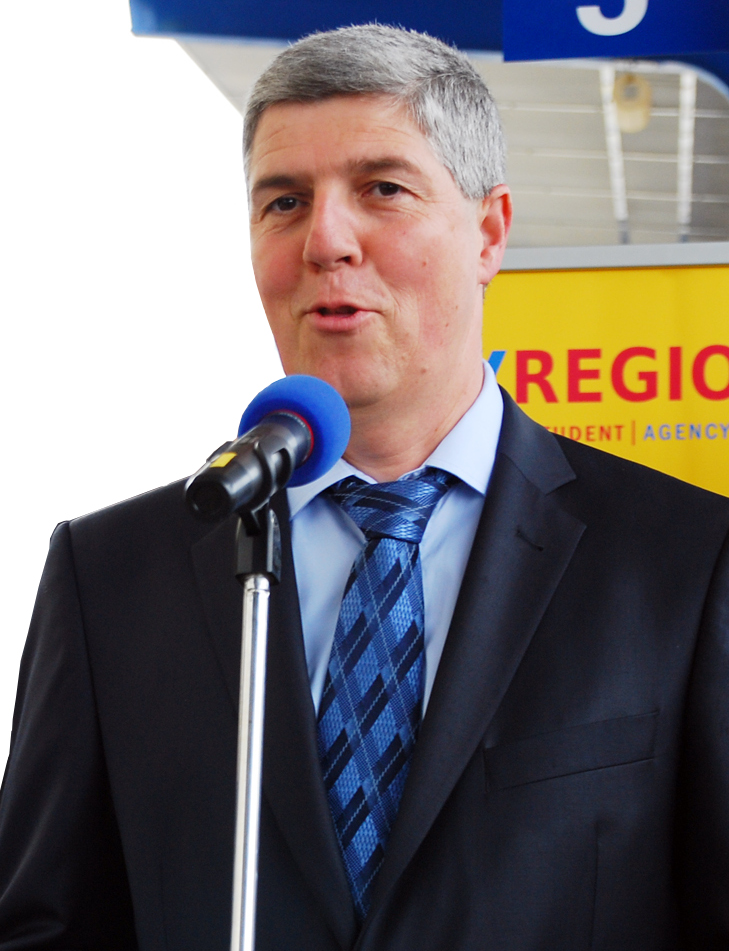 Béla Bugár